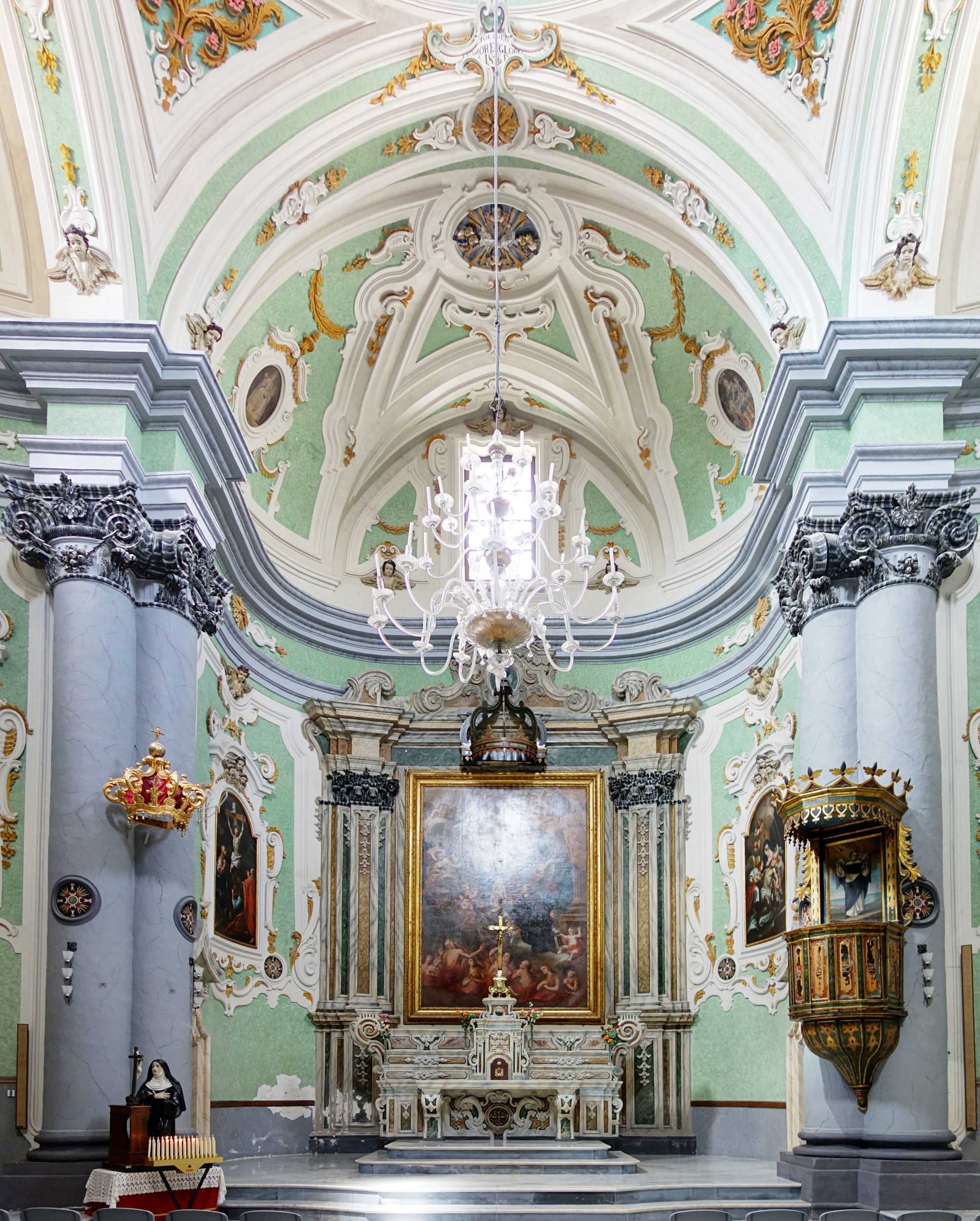 Le chœur de l'église Il Purgatorio Nuovo de Matera.